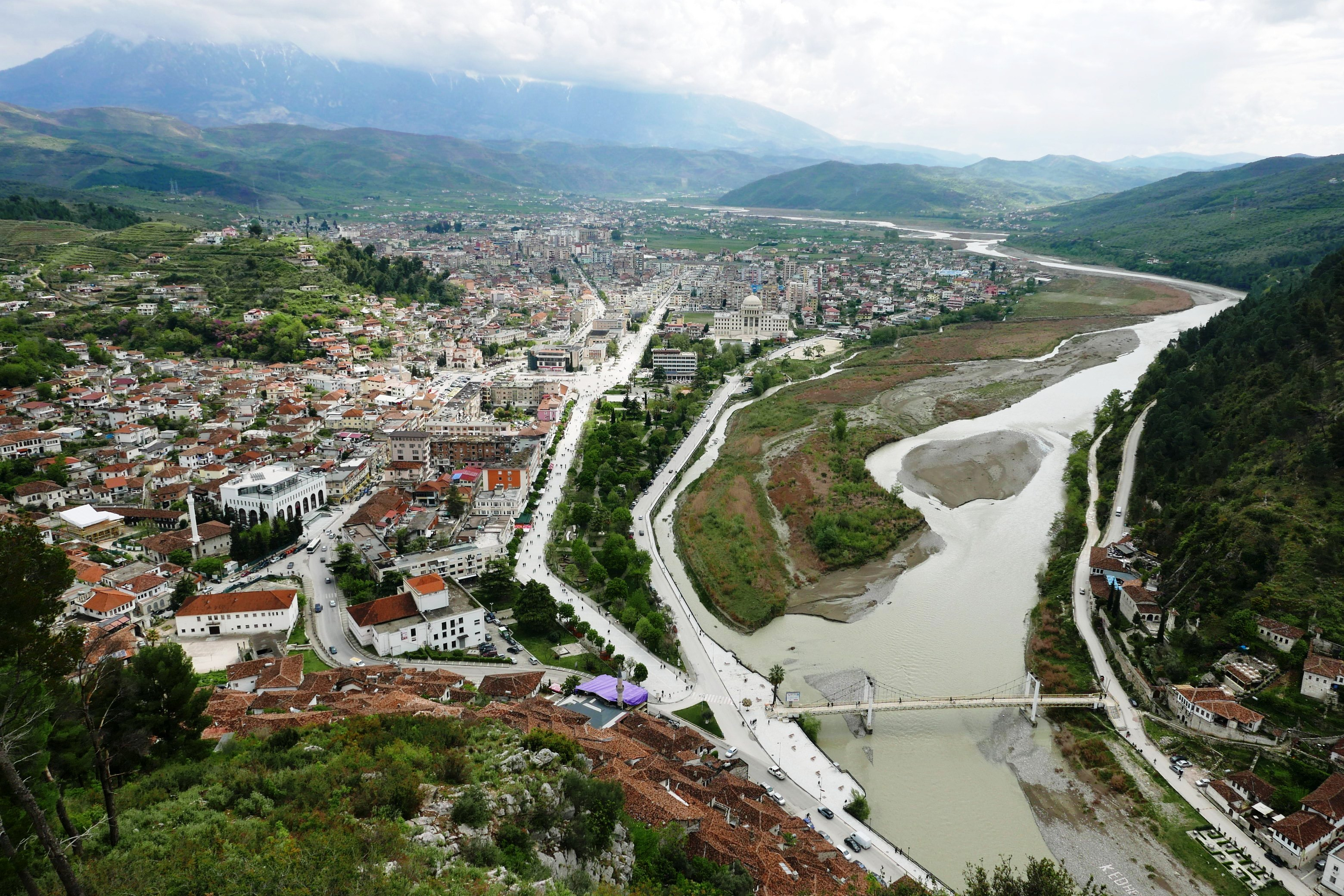 Berati me Osumin, Shqipëri